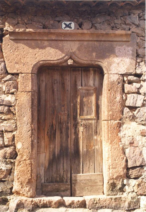 Bortigali. Centro storico. Via Re Galantuomo. Portale con architrave "aragonese" (sec XVI/XVII)